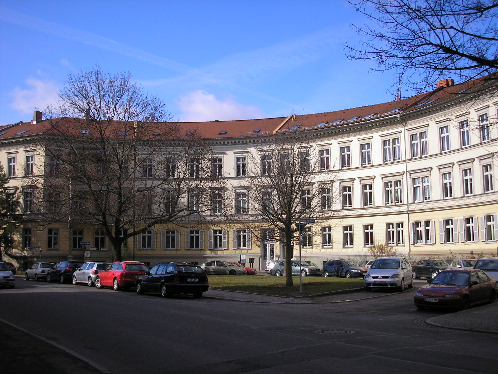 Ein Rundhaus aus der zweiten Hälfte des 19. Jahrhunderts in der Wilhelm-Külz-Straße im Brühl in Erfurt (Thüringen).